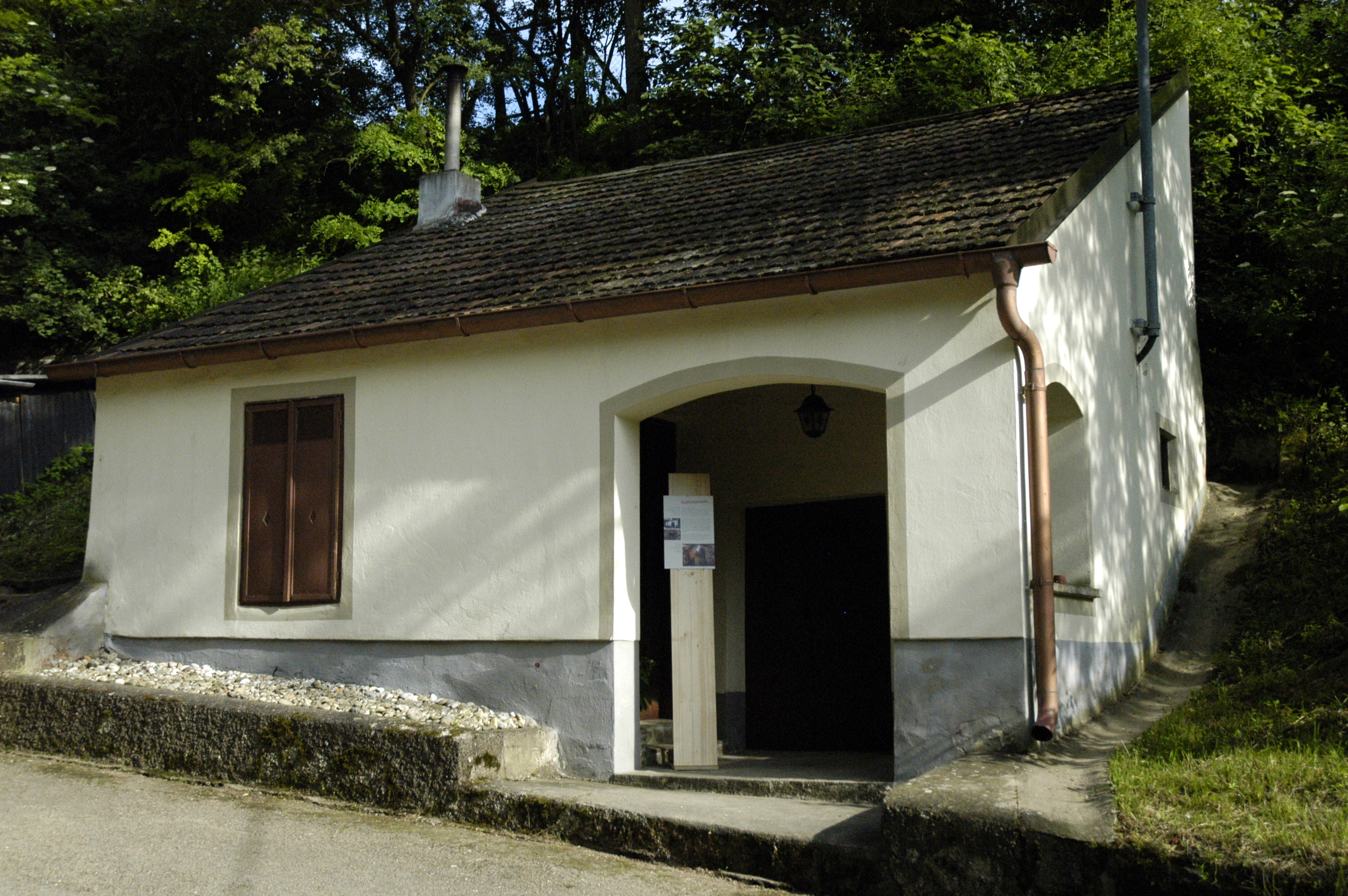 Keller Vogelhuber in der Mühlbergkellergasse in Sitzendorf an der Schmida